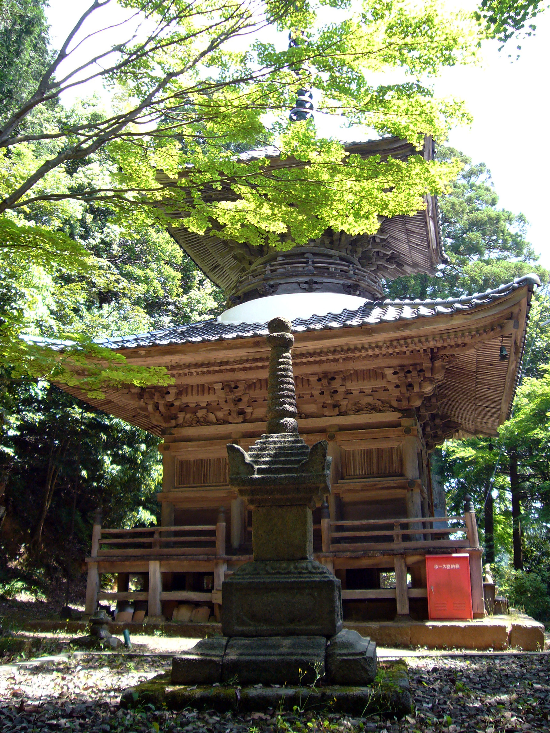 Onsenji, Kinosaki Onsen in Toyooka, Hyogo, Japan